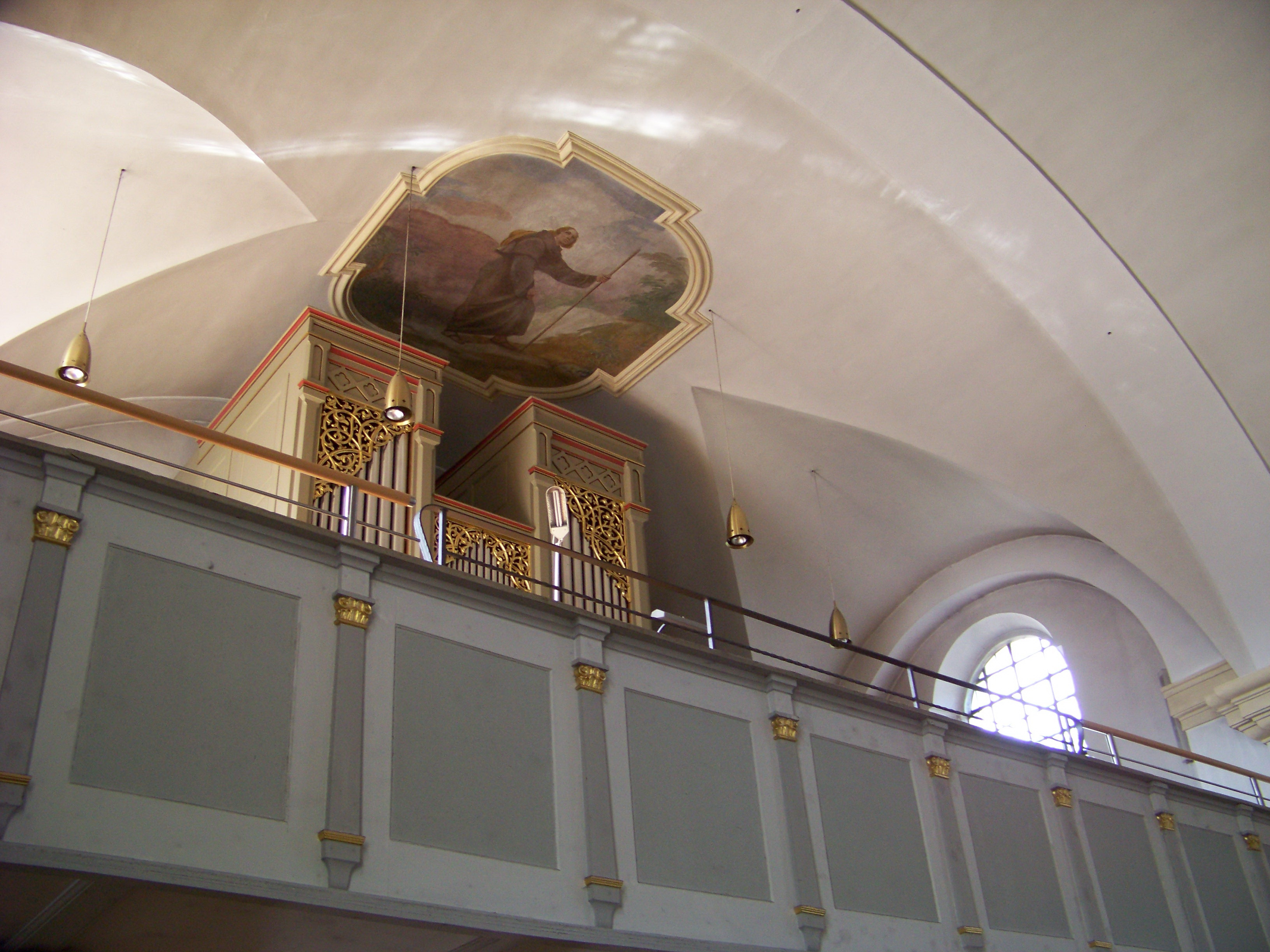 Weihmichl, Hauptstraße 24. Pfarrkirche St. Willibald. Saalkirche mit eingezogenem Chor, Langhaus und Chor barock. Orgelempore mit gerader Brüstung.